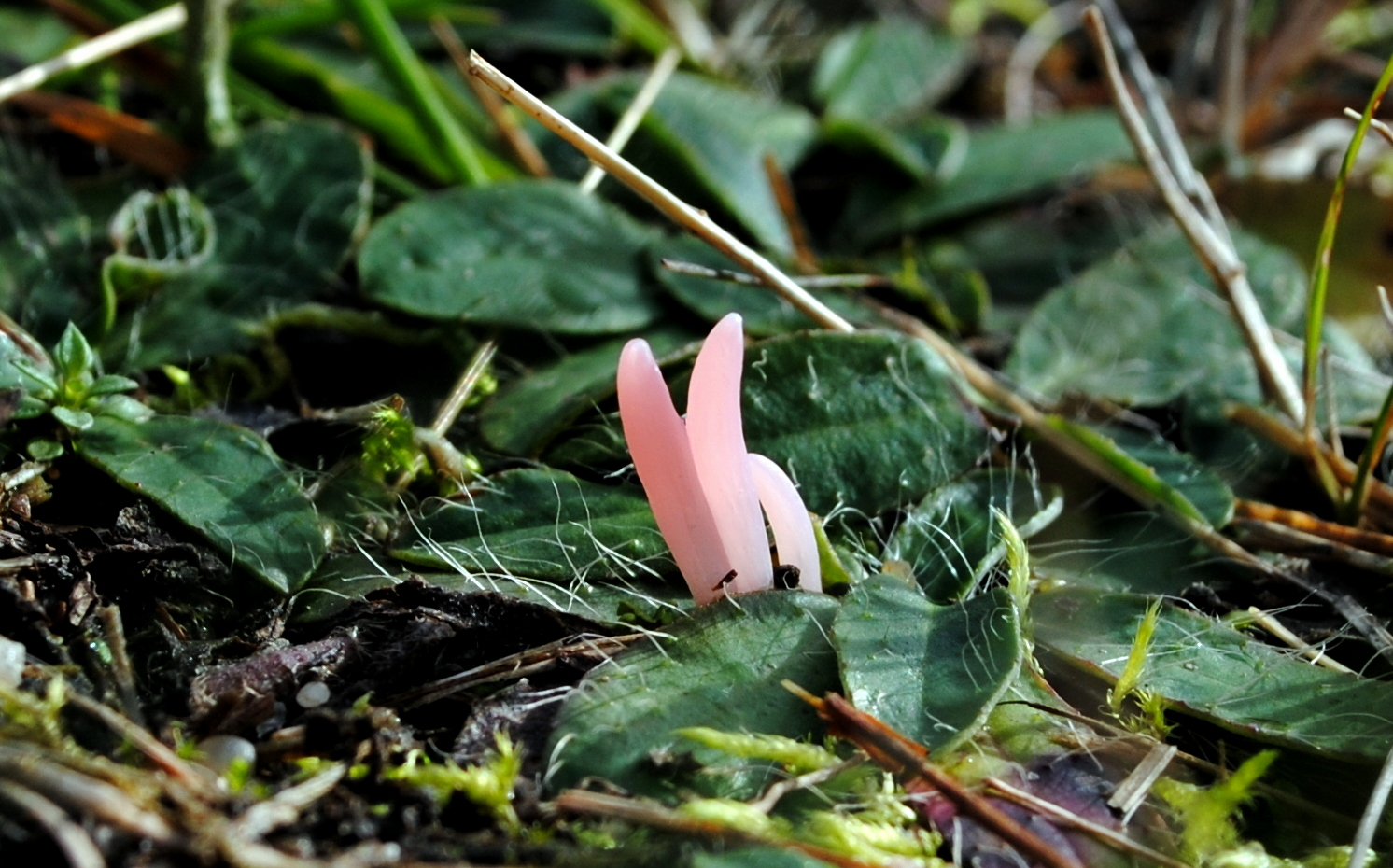 Grupa owocników Clavaria rosea, pierwsze stanowisko gatunku w Polsce